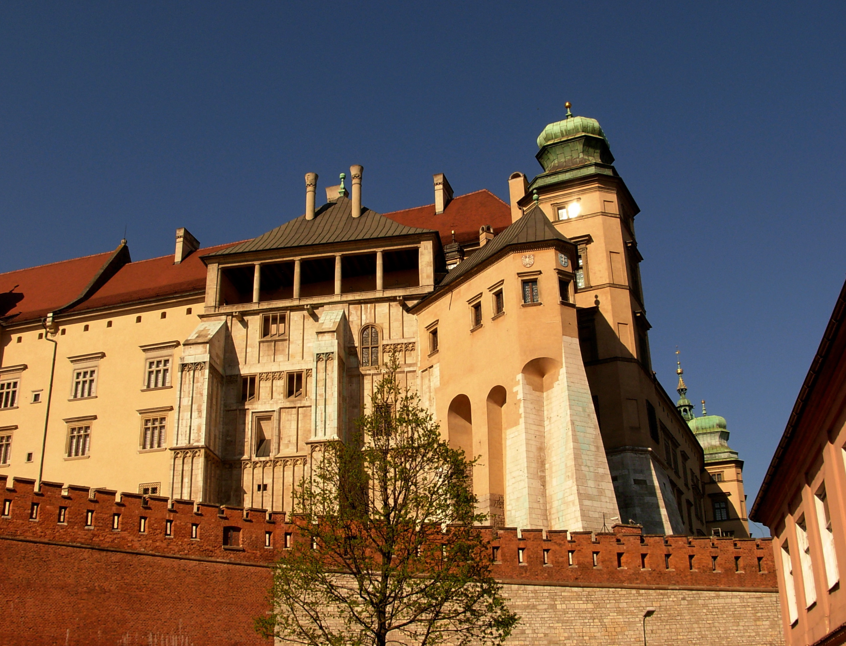 Vavelio pilis